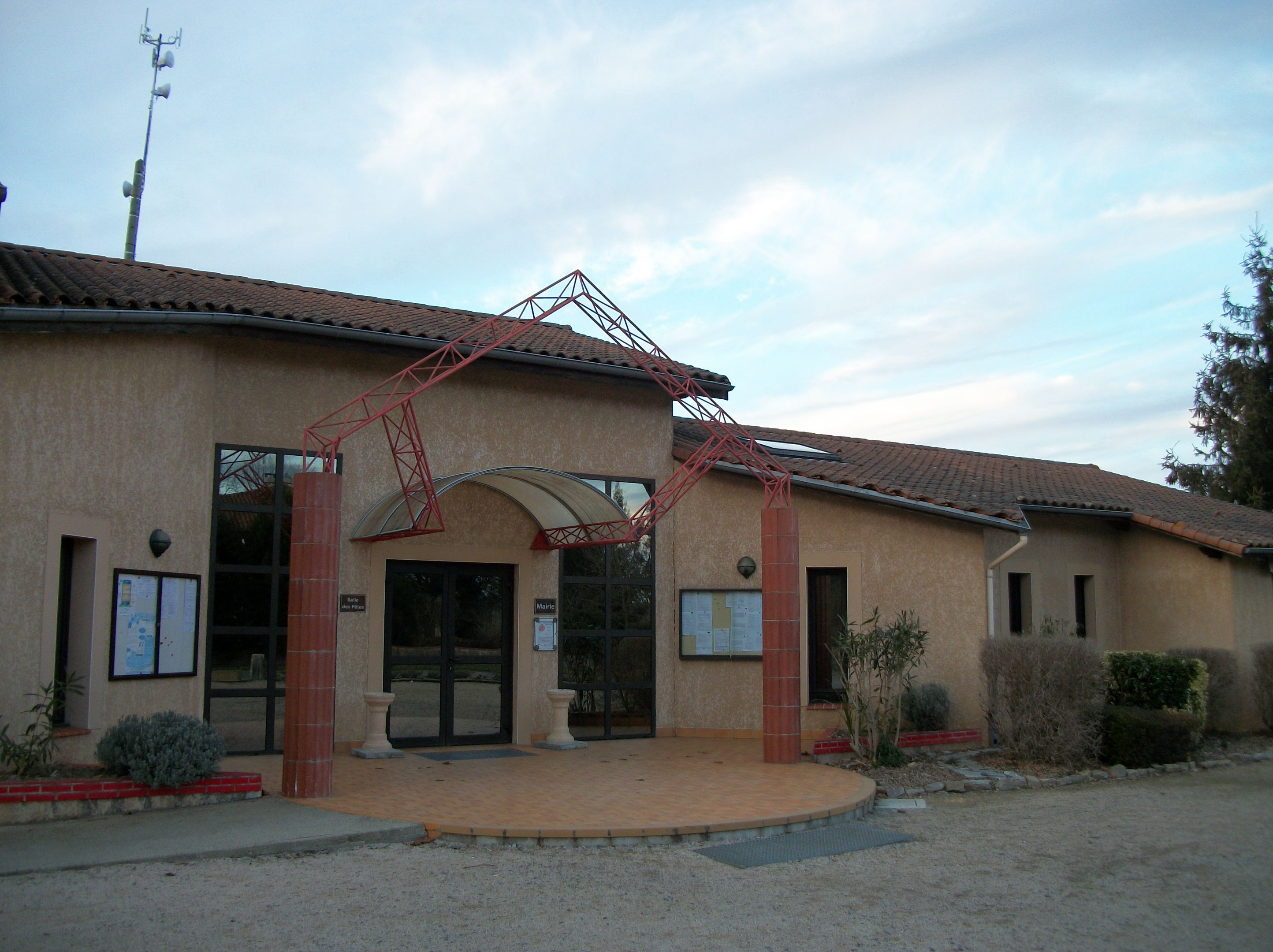 Mairie